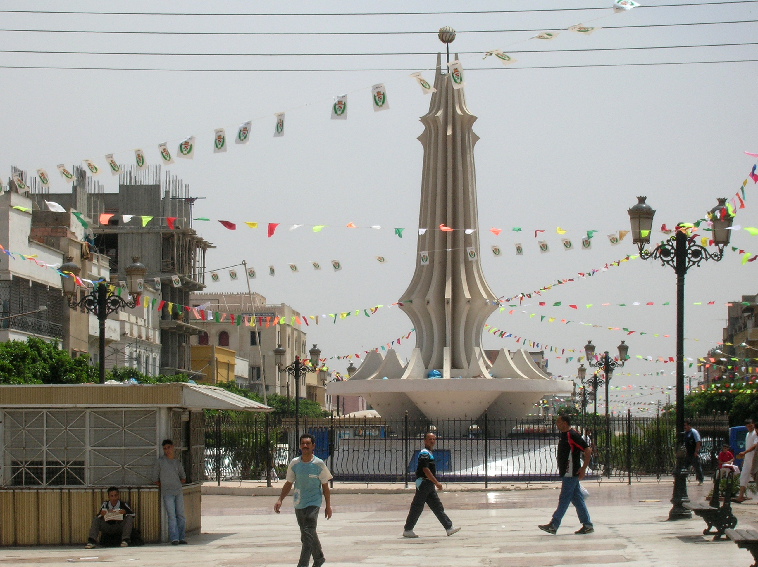 Tahtaha - Mdina Djdida